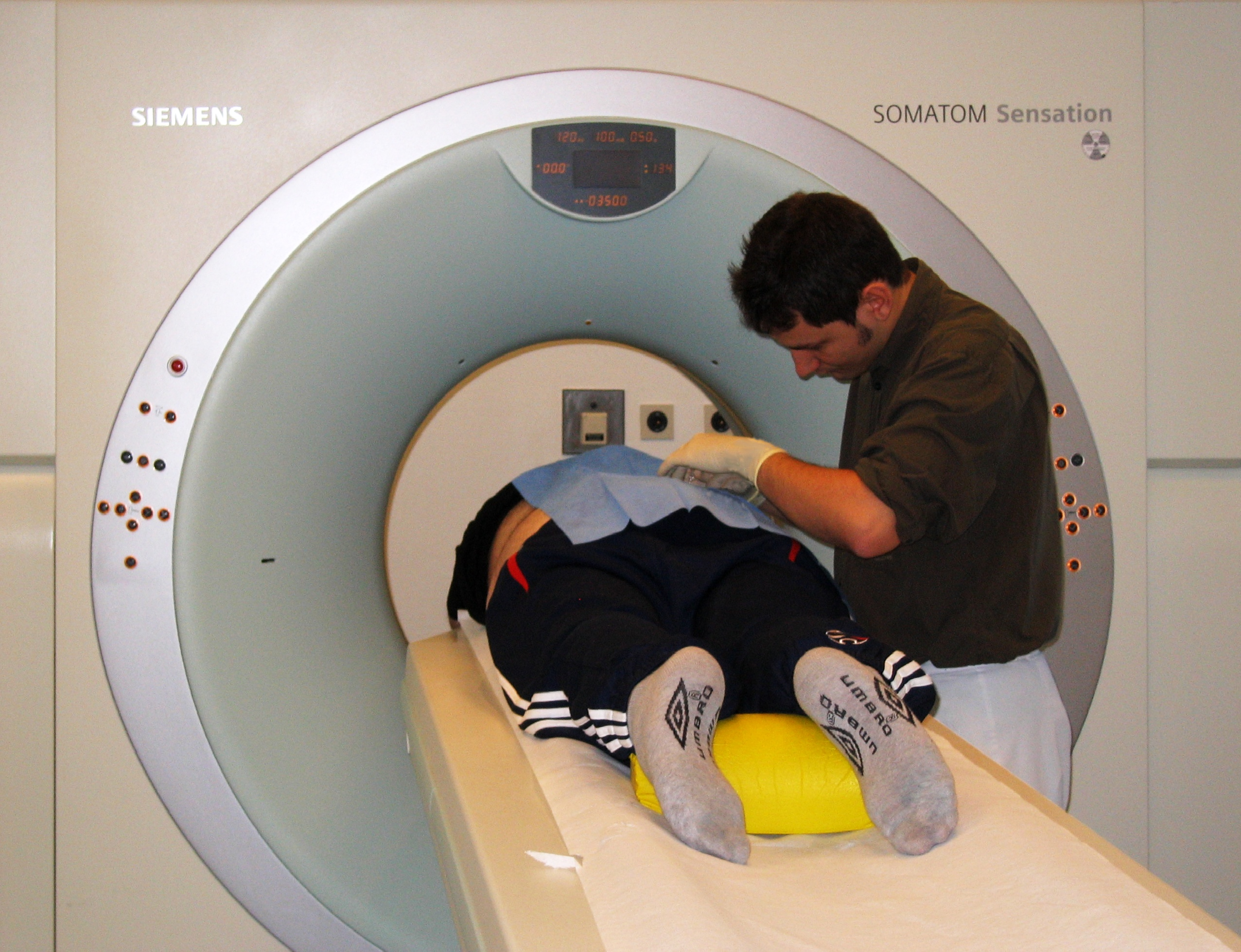 Durchführung einer CT gesteuerten Periradikulären Therapie. Koproduktion von Bernd Brägelmann und Marcel Leisten. Nachbearbeitung mit GraphicConverter (Entzerren, Zuschneiden) und Gimp (Gradatationskurven, Unscharf maskieren)